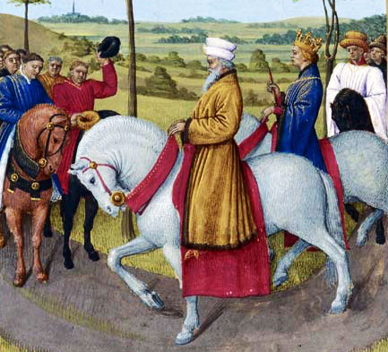 L'empereur Charles IV et les dignitaires de Paris Grandes Chroniques de France, enluminées par Jean Fouquet, Tours, vers 1455-1460 Paris, BnF, département des Manuscrits, Français 6465, fol. 442v. (Livre de Charles V) Le 4 janvier 1378, l'empereur Charles IV et son fils Wenceslas rencontrent, entre Saint-Denis et La Chapelle-Saint-Denis, le prévôt de Paris, le prévôt des marchands, le chevalier du guet, les échevins et les bourgeois de la ville de Paris envoyés par le roi à leur rencontre.